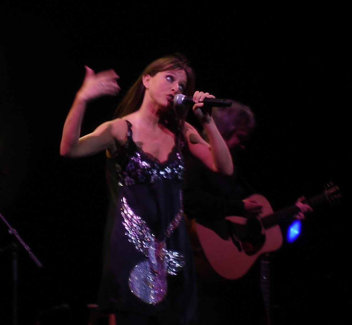 Concert de Lynda Lemay, festival de la cité, Carcassonne, Aude (11), France, juillet 2007